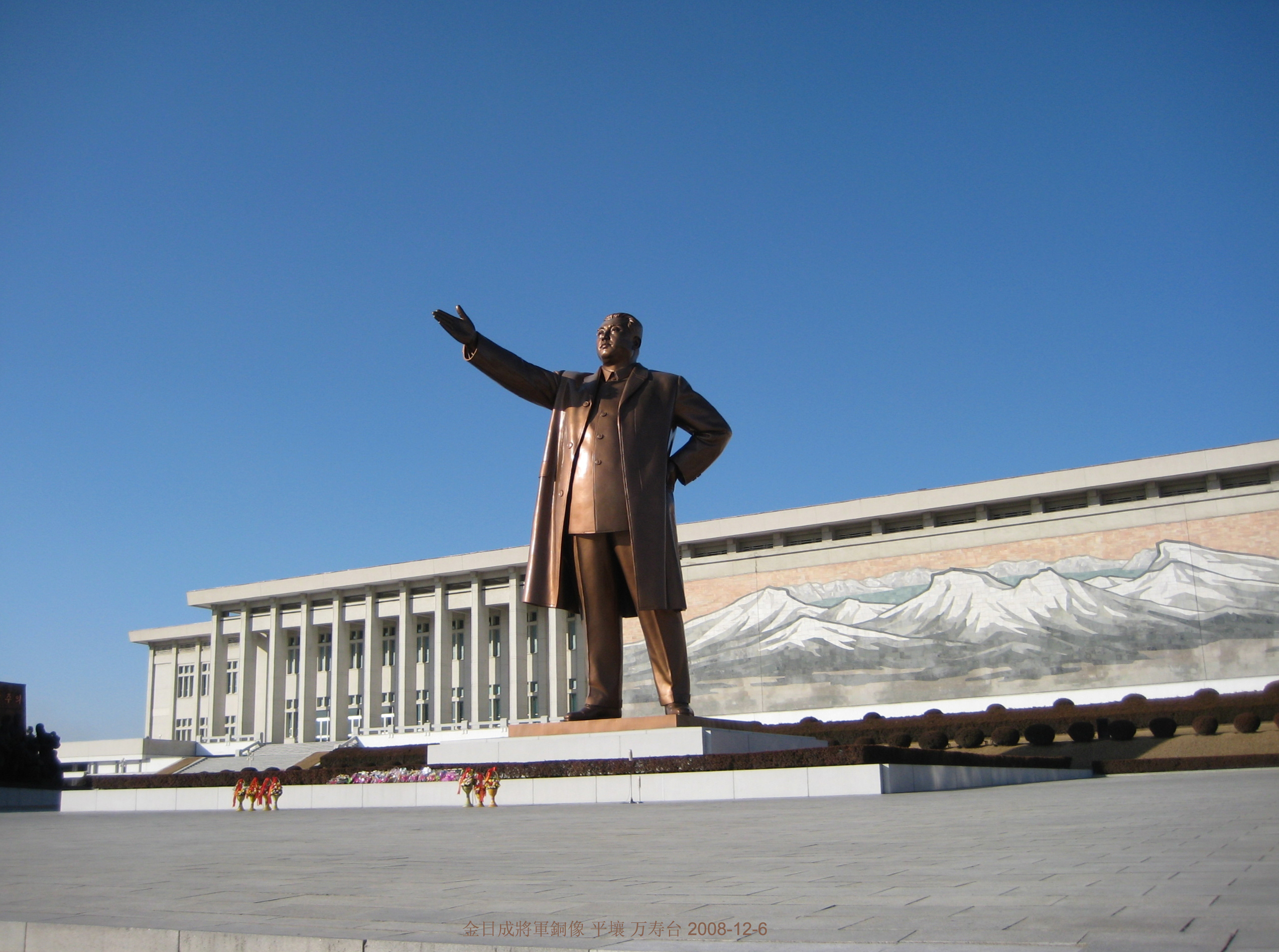 平壤 万寿台 평양 만수대 Mansudae